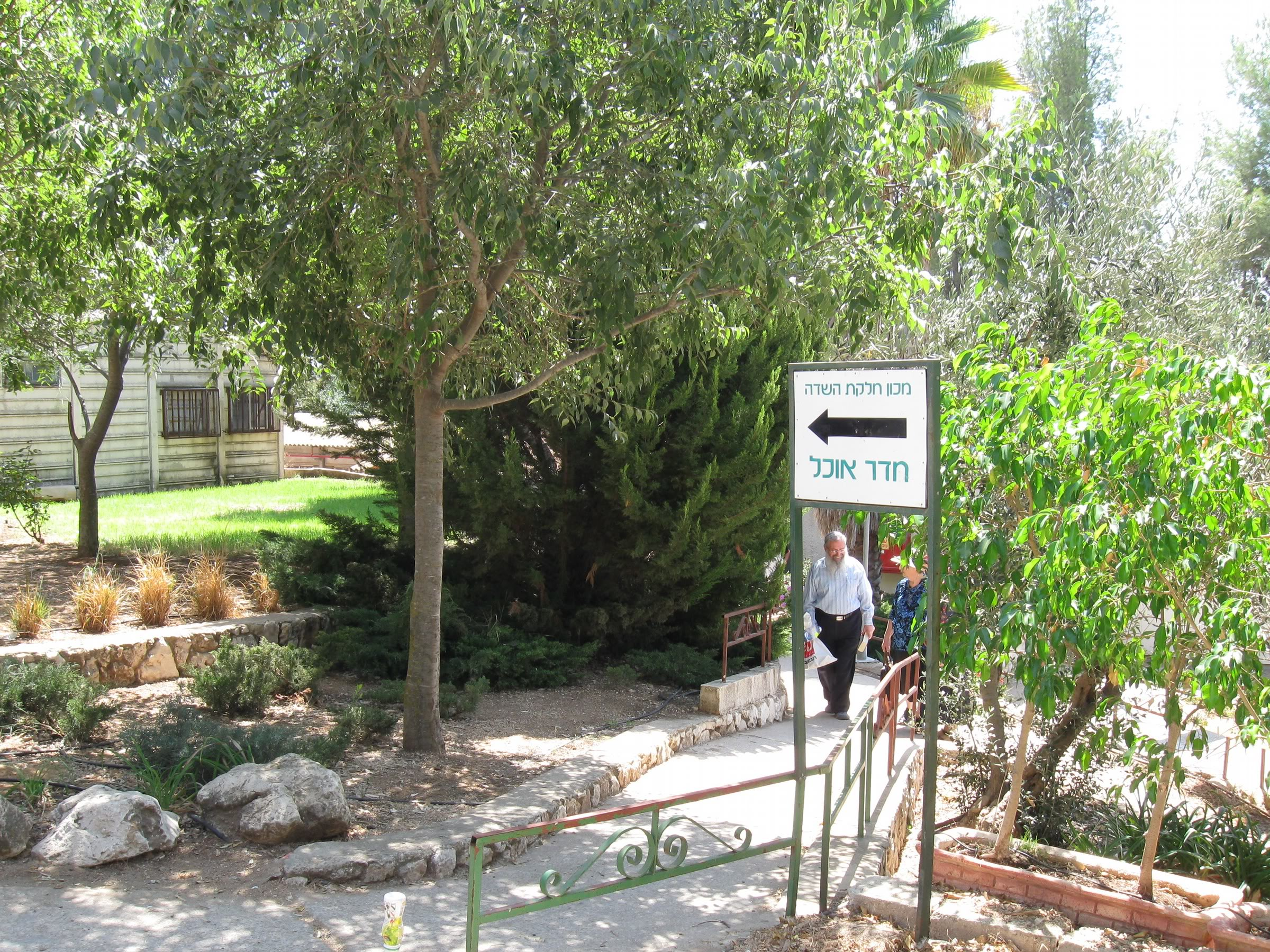 אלון מורה